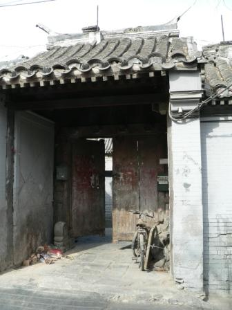 四合院现状 拍摄